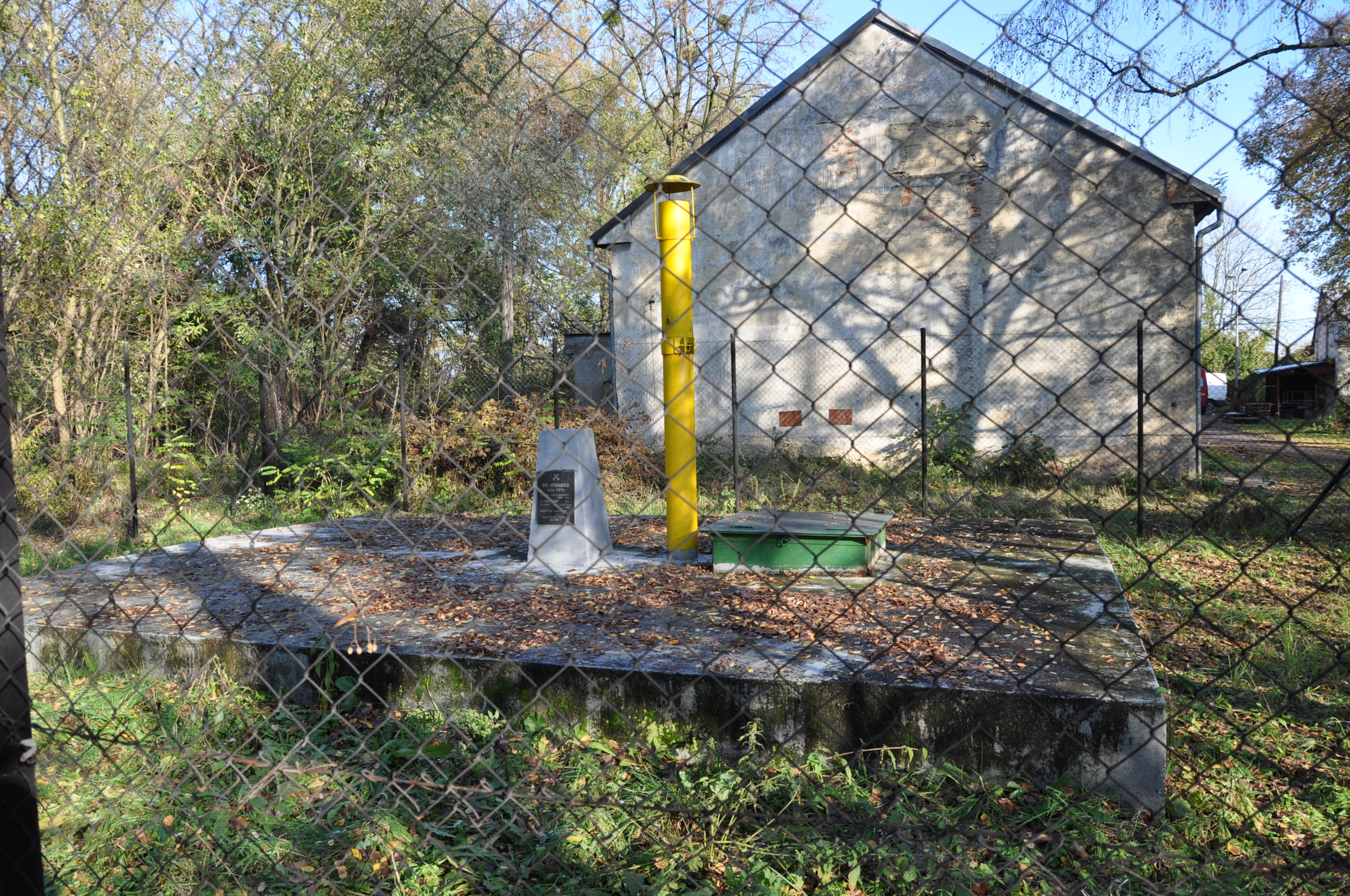 Označení jámy Petr, Ostrava-Michálkovice.